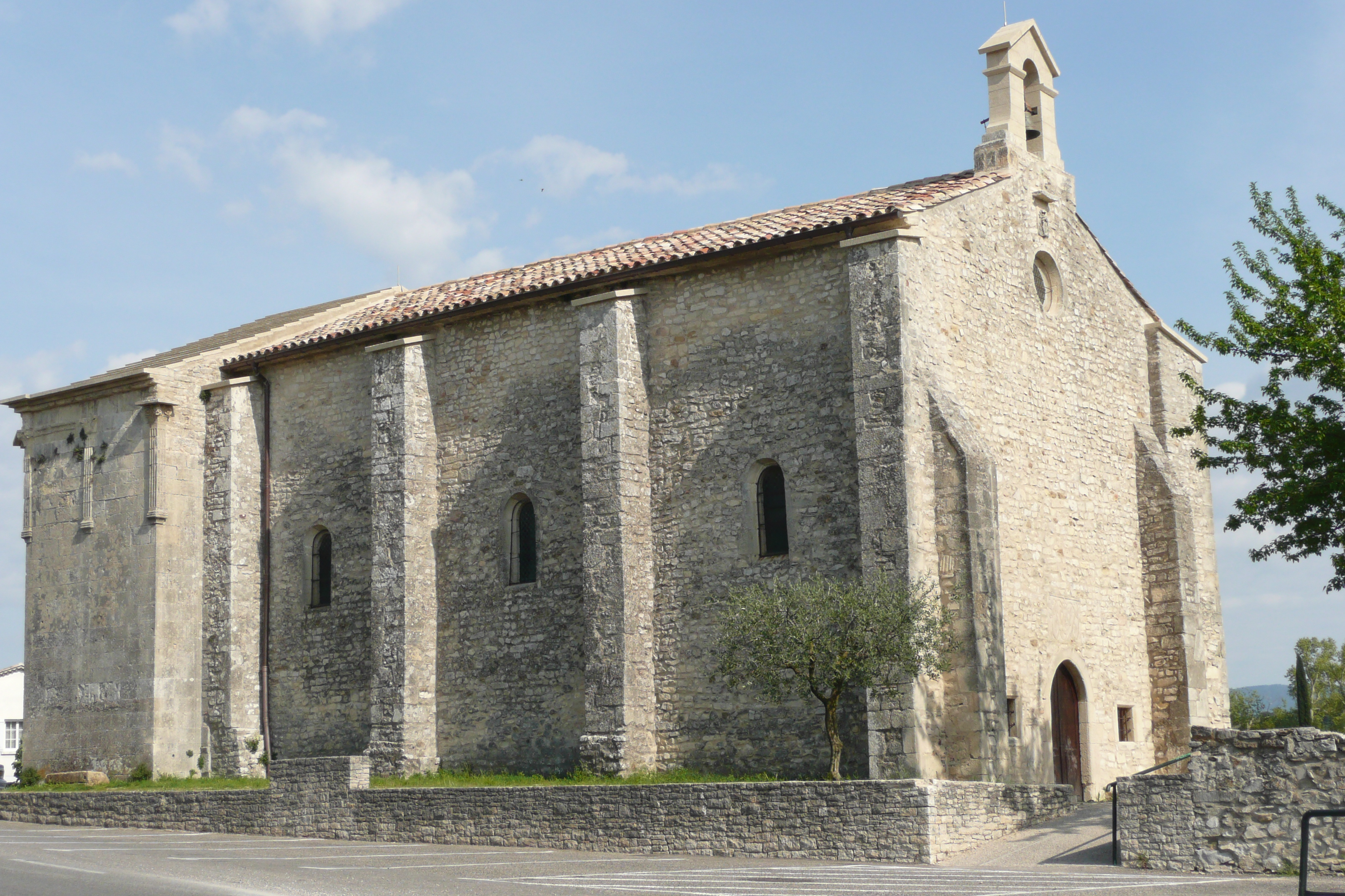 Eglise à Vaison-la-Romaine. Chapelle Saint-Quenin